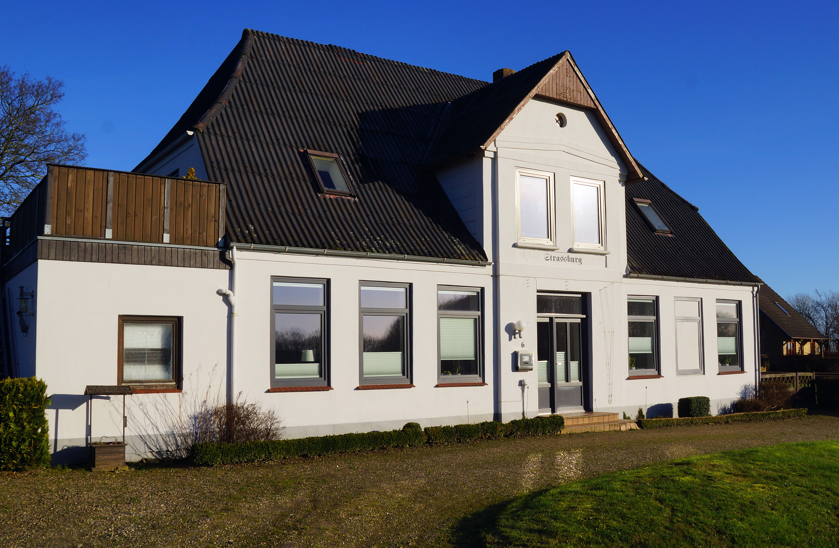 Ehemaliger Landkrog Strassburg in Südsteinberg. Der Name Strassburg ist vmtl wegen der Einquartierung von Angehörigen des französischen Militärs zwischen 1808-1813 im Landkroggebäude entstanden. - Foto Wolfgang Pehlemann DSC6813